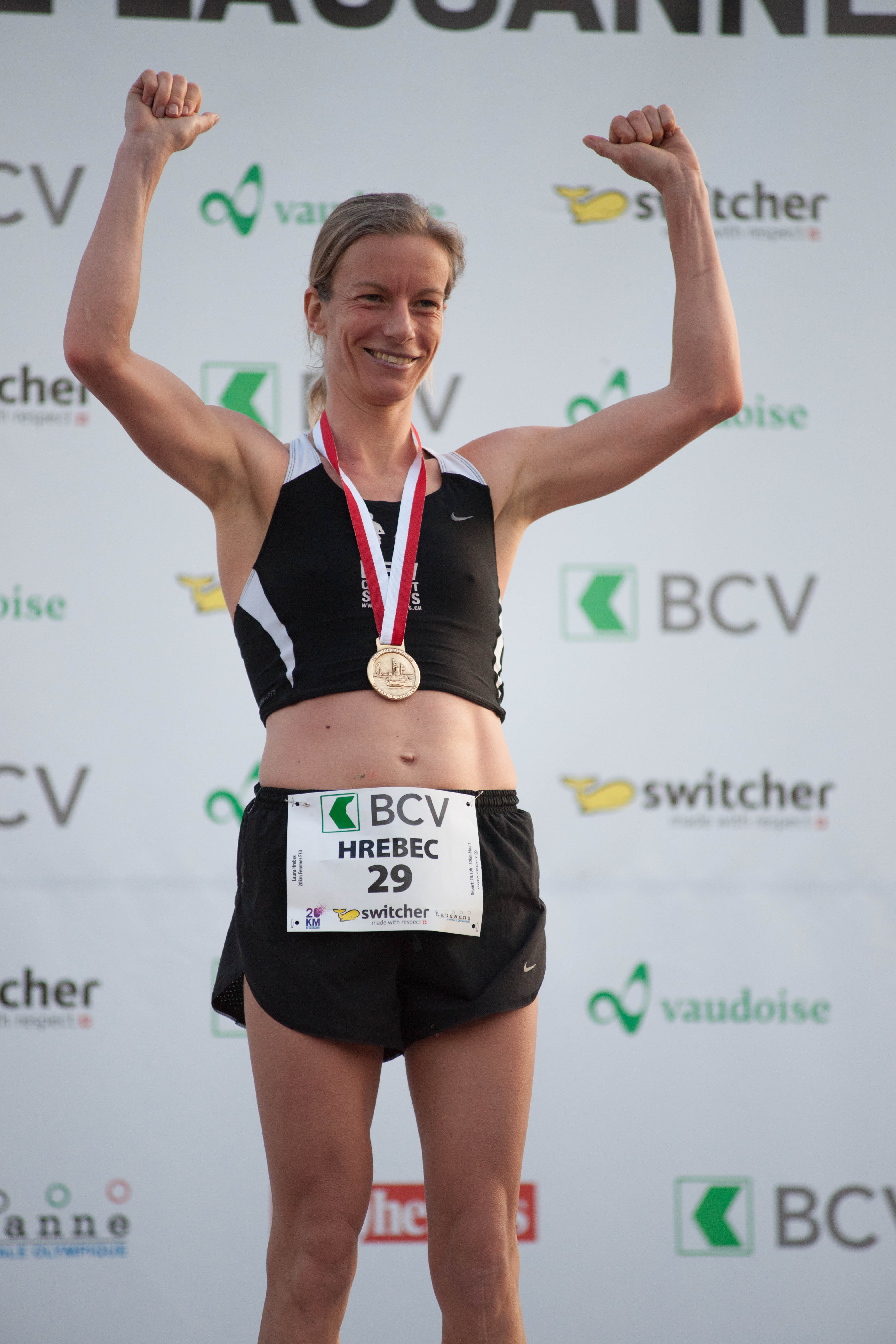 Laura Hrebec - 20 km de Lausanne 2012